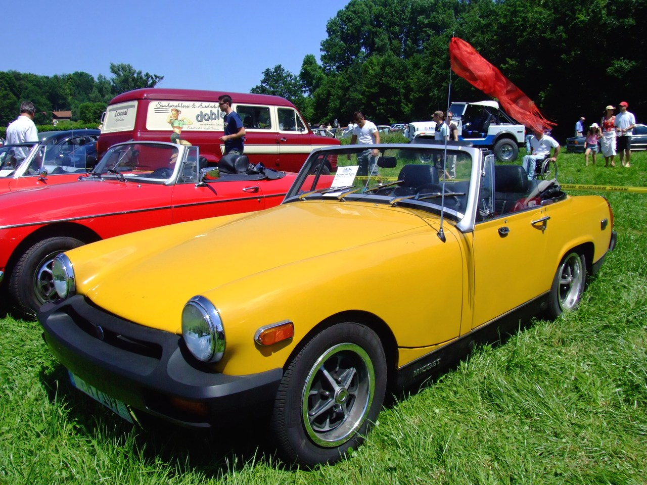 Quelle: selbst fotografiert, 06/2007 Fotograf: Späth Chr.